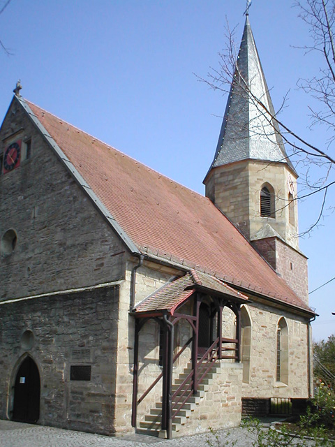 Dorfkirche Maria Magdalena in Dürrenzimmern